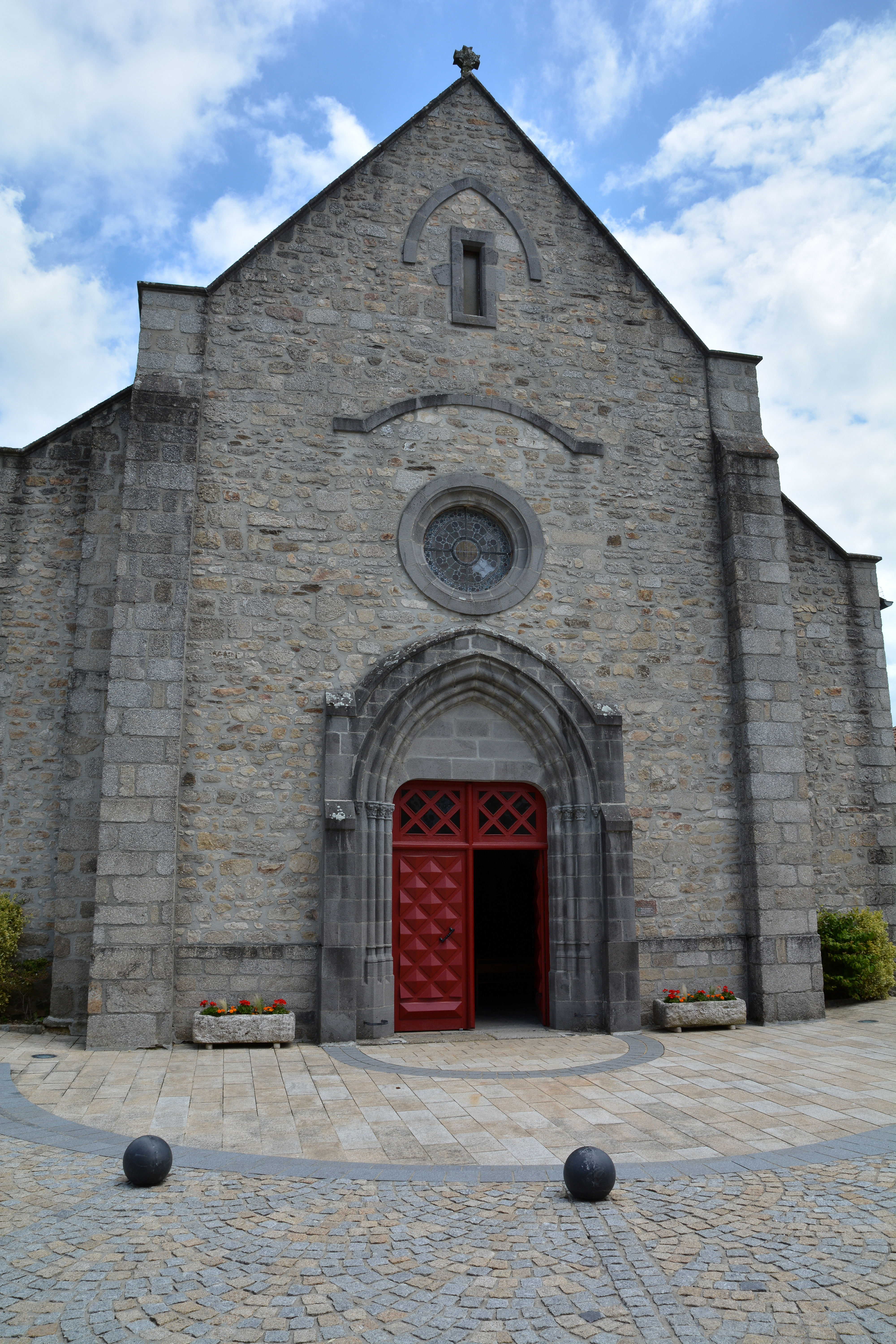 Église de Marcolès, Cantal Auvergne, France